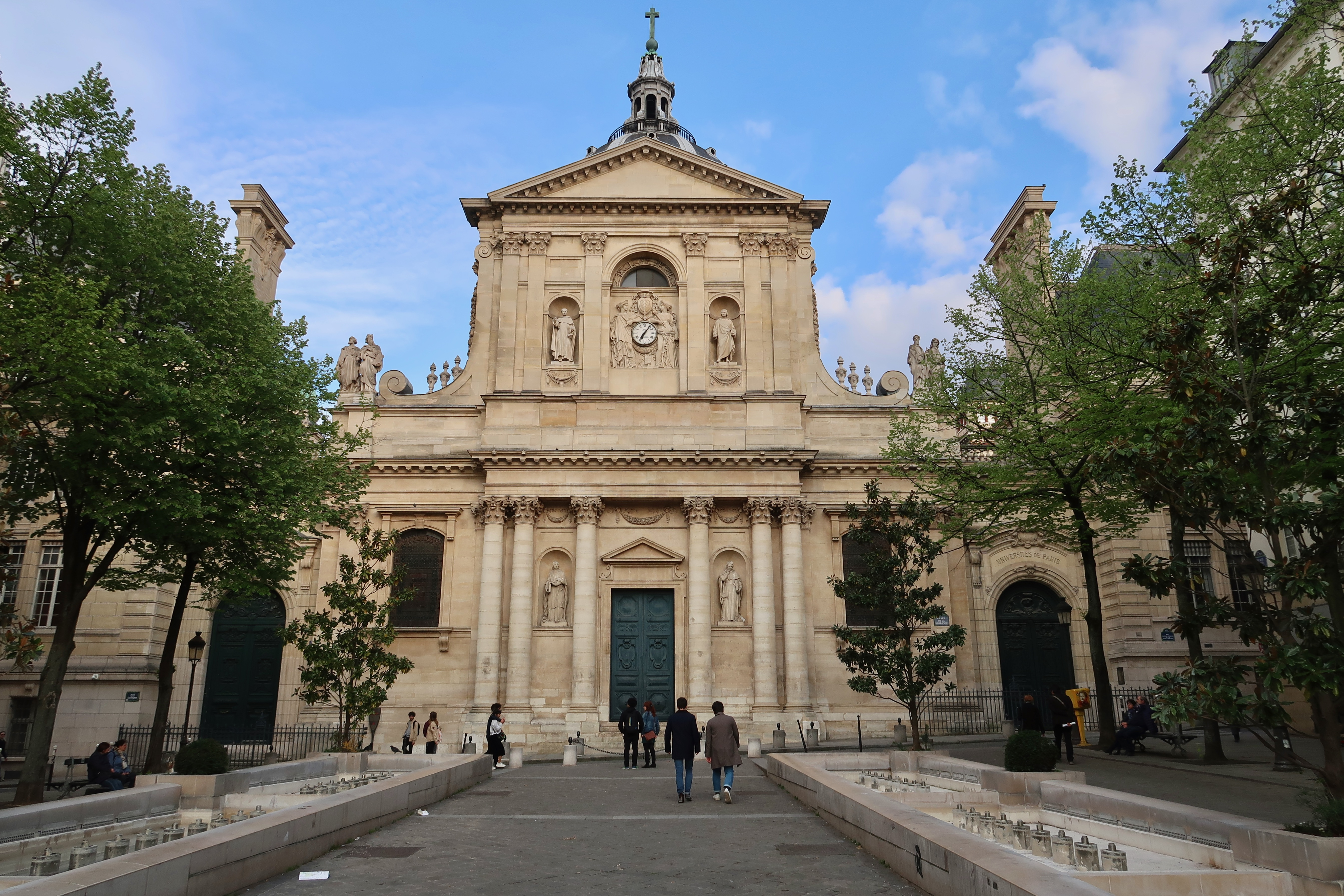 La Sorbonne et une partie de sa place (Paris, 5e).